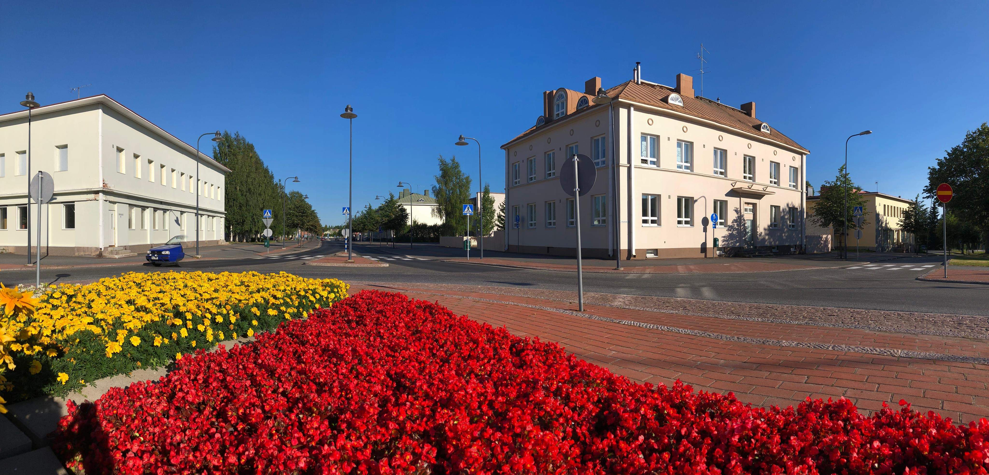 Центральная улица